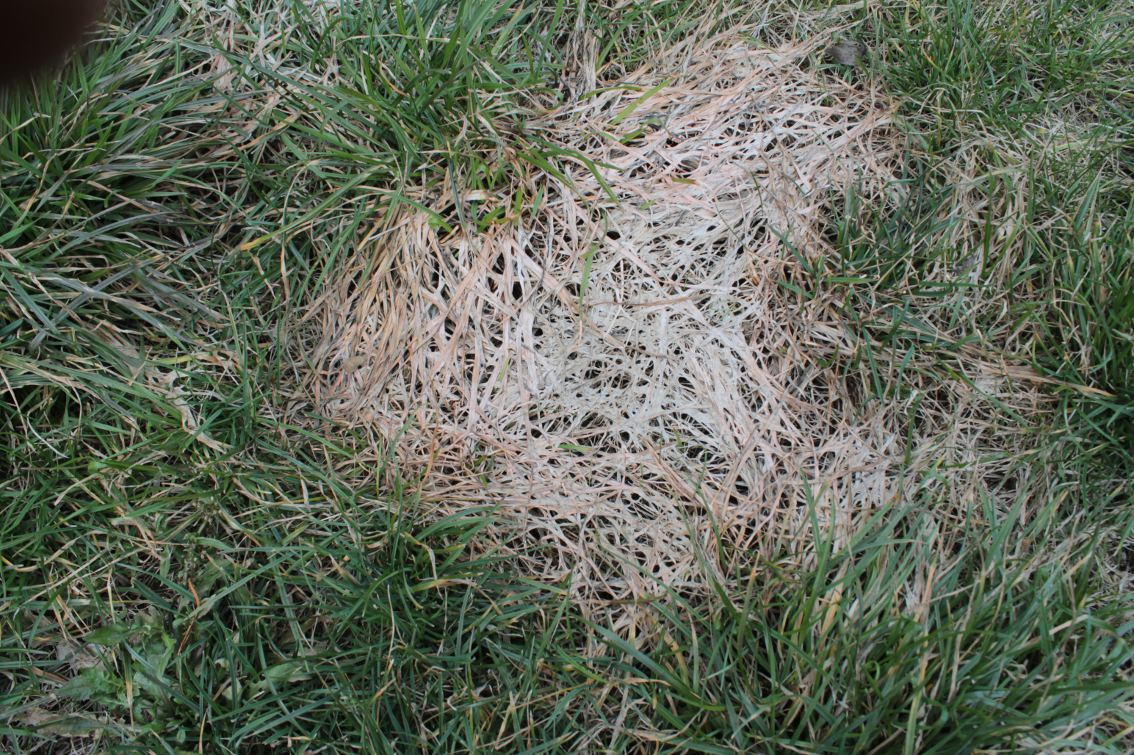 plíseň sněžná, Brno Komín, jaro 2013